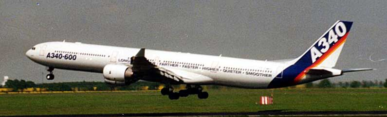 A340-600 bei der ILA 2002 in Berlin